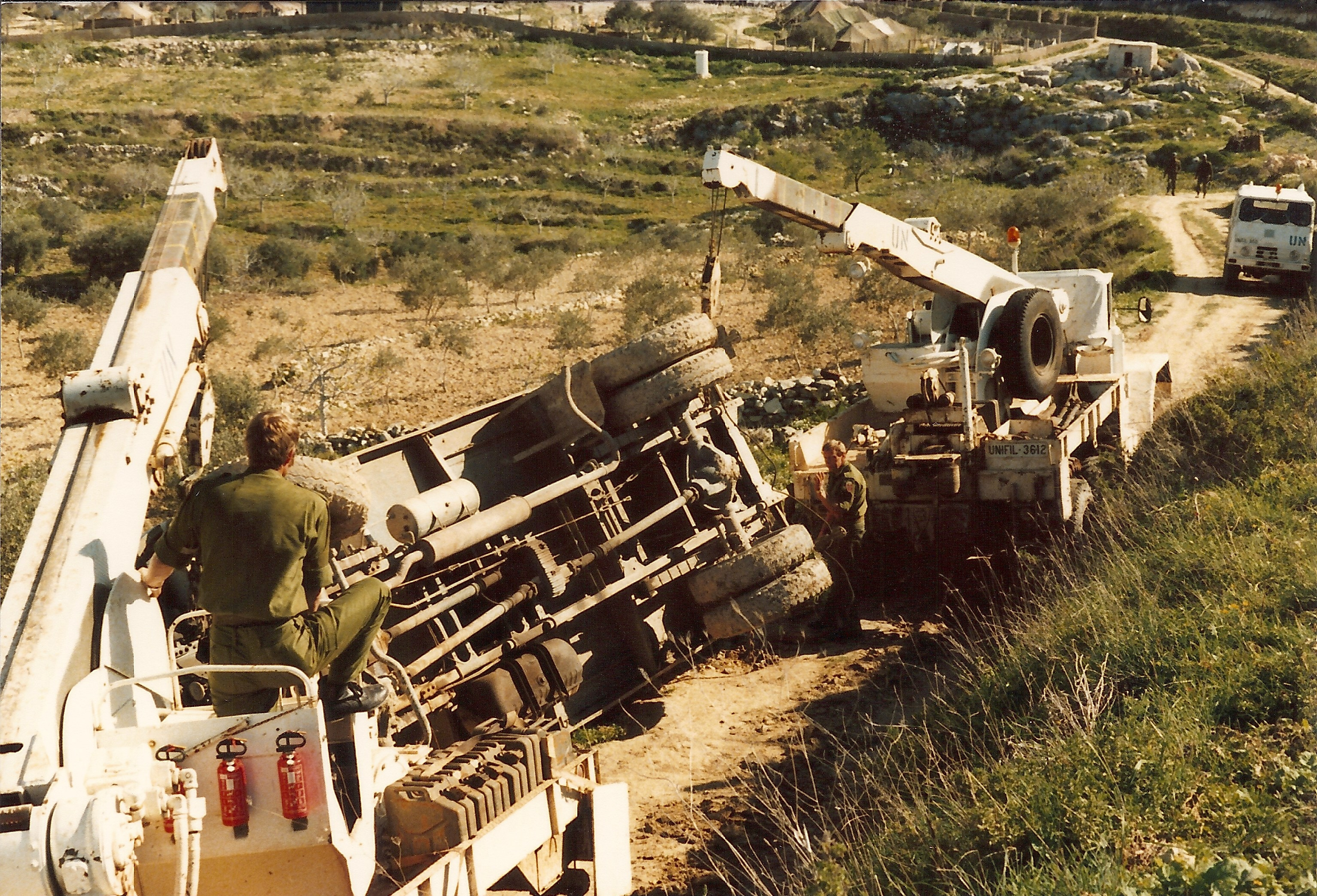 Bilbergning